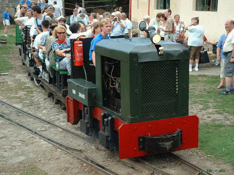 P5-ös pályaszámú (2244,4105), MD–40-es típusú dízelmozdony a Kemencei Erdei Múzeumvasúton